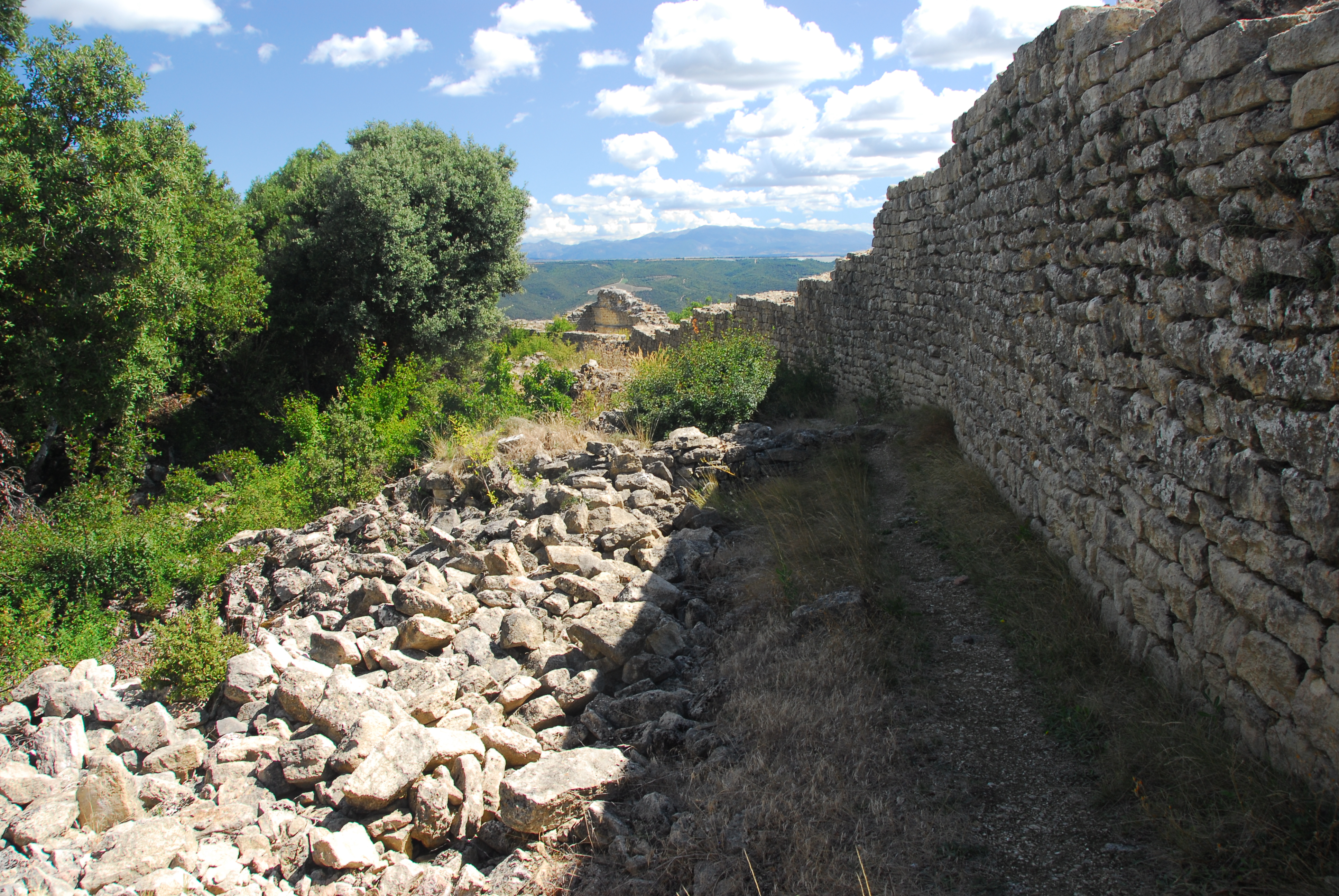 Prieuré de Ganagobie, Villevieille, innere Gebäuderuinen